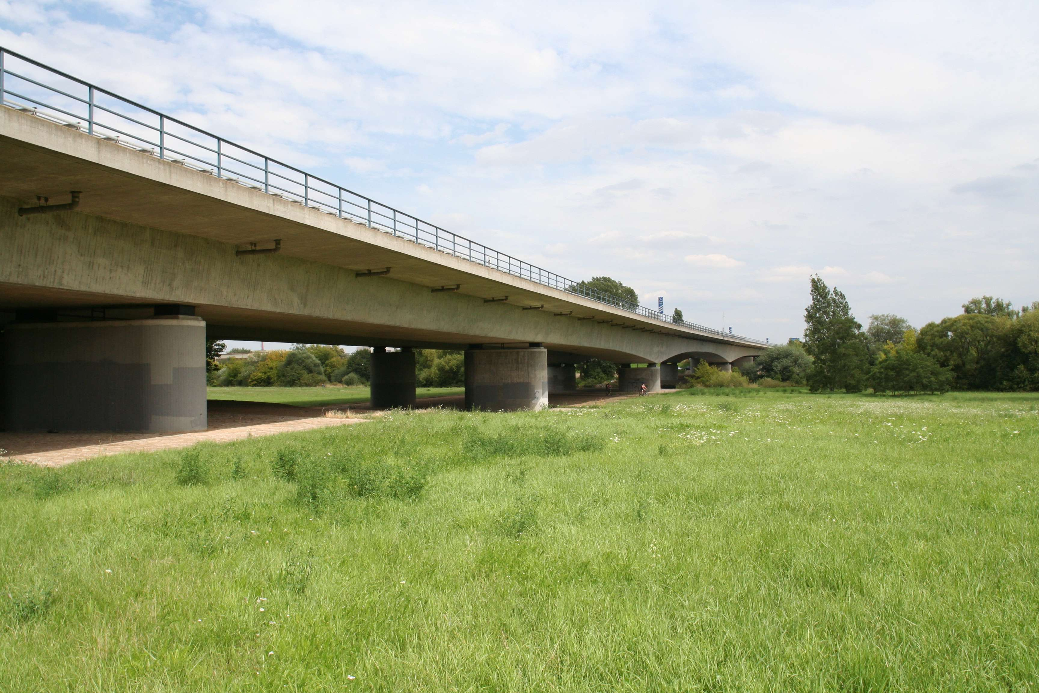 Mainbrücke Oberndorf bei Schweinfurt